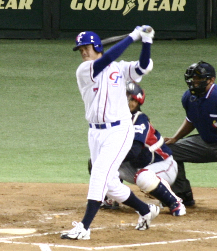 林智勝Bân-lâm-gú: Lîm Tì-sìng. 林智勝